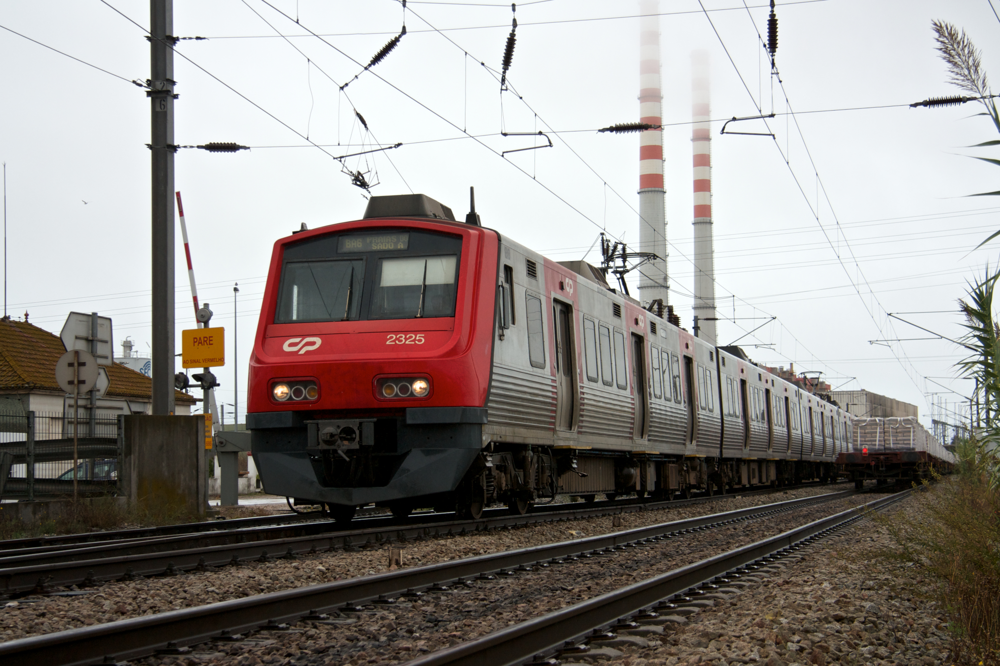 Tipo: Comboio Urbano 17237 [Barreiro - Praias • Sado–A] Local: Estação de Praias do Sado [Linha do Sul, PK 33] Data e hora: 17 de Outubro de 2012 [15h37] Material: Automotora 2325 [Unidade Quádrupla Eléctrica]